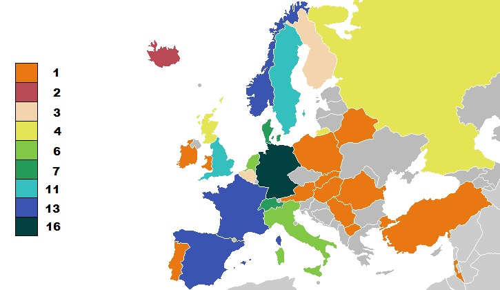 Teilnehmer an der U-19-Fußball-Europameisterschaft der Frauen